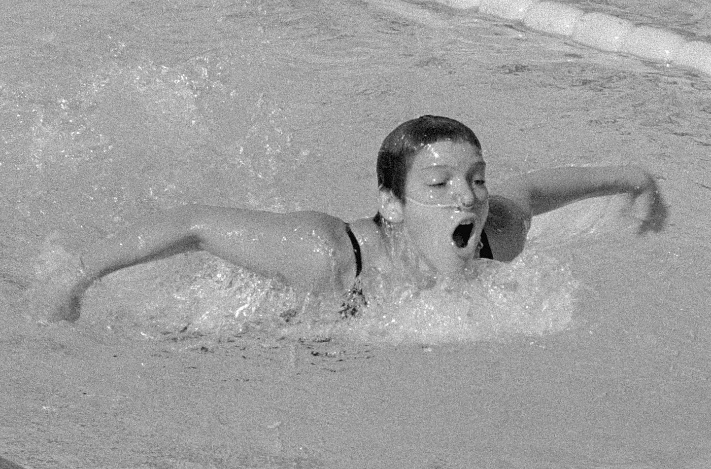 Olympische Spelen te Rome, Wood in actie (vlinderslag). Location: Italië, Rome